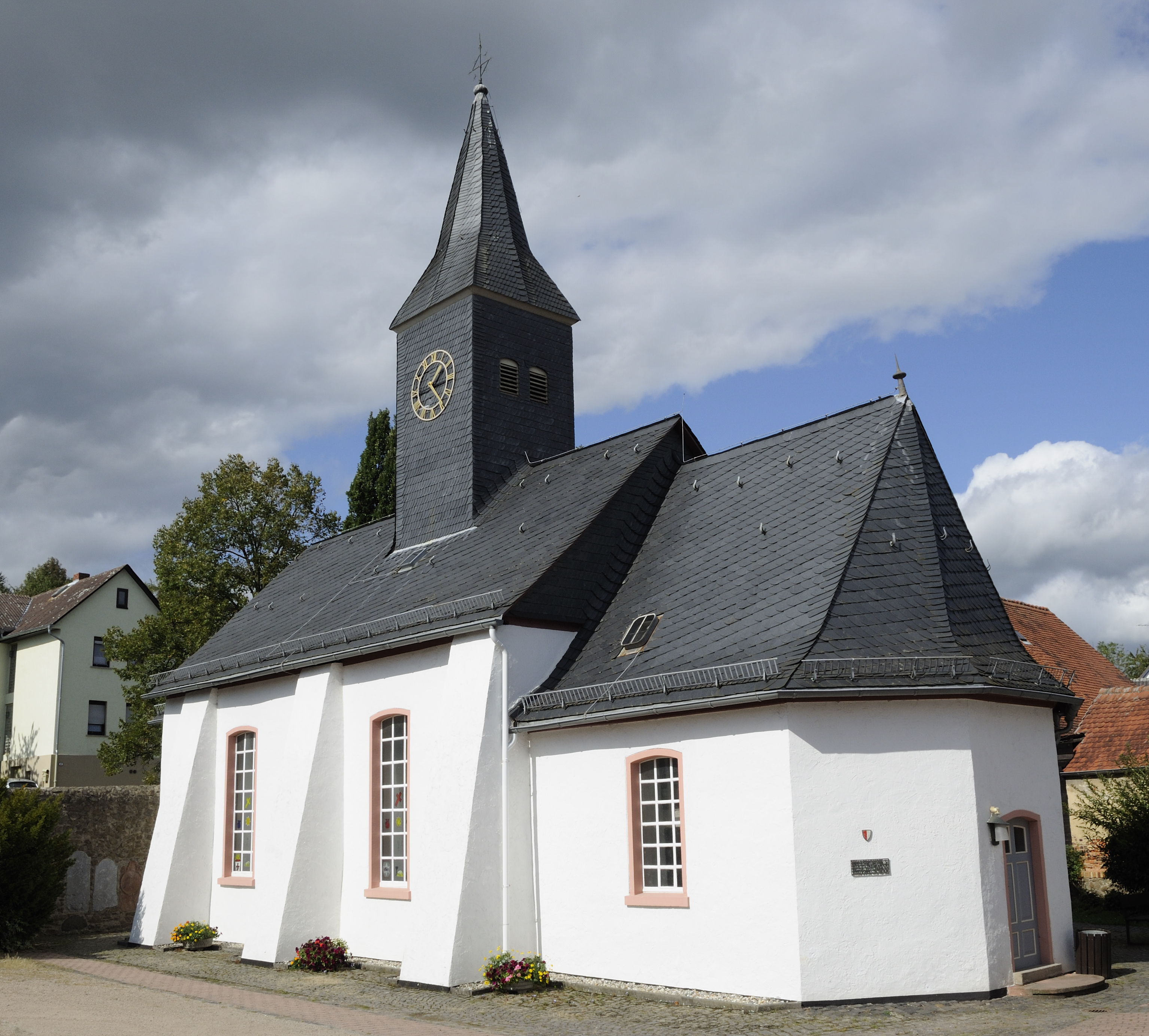 Dieses Foto entstand im Rahmen des Projekts Wiki Loves Monuments Mittelhessen, das aus dem Community-Projektbudget von Wikimedia Deutschland e. V. gefördert wurde.